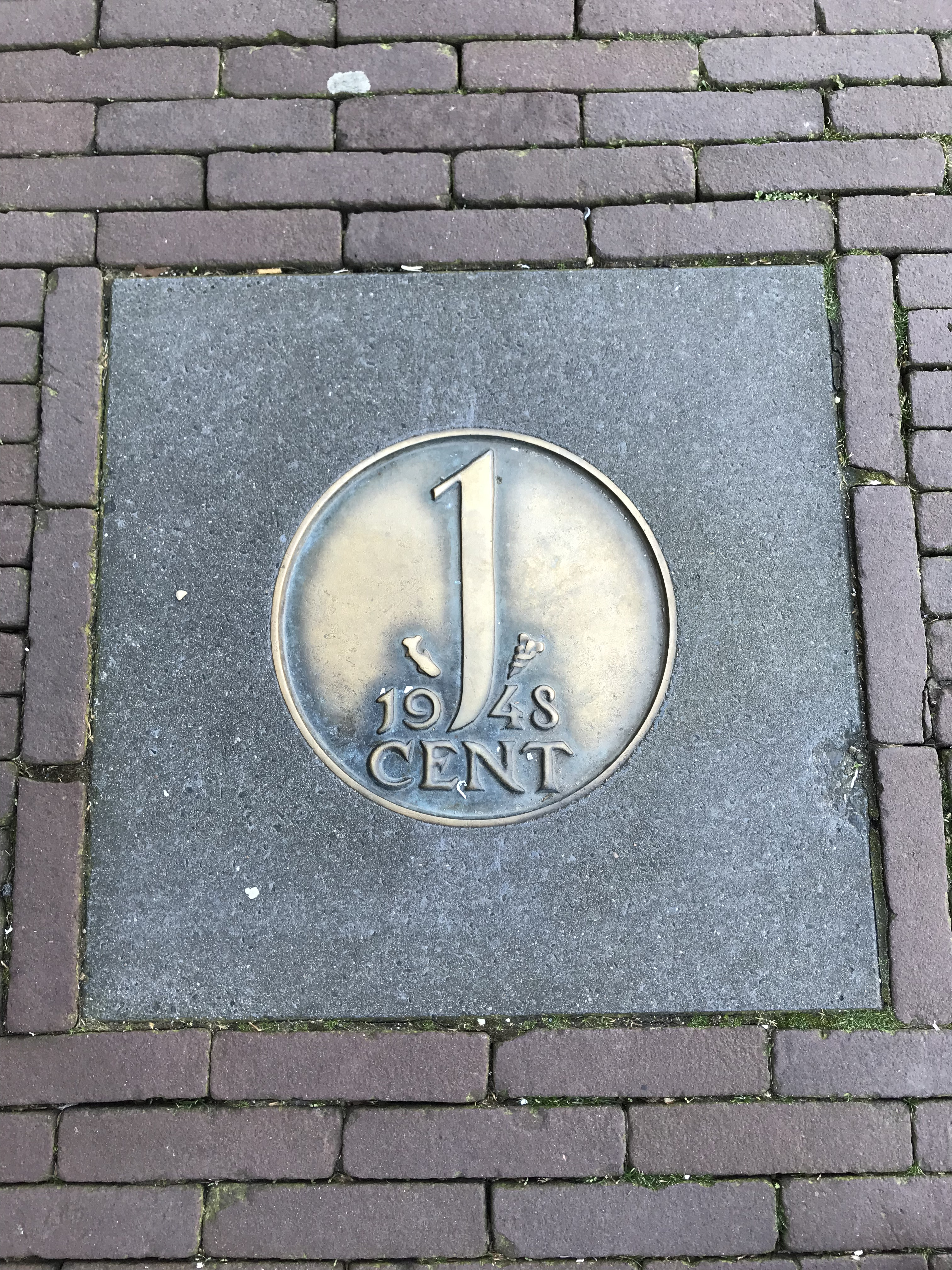 Op de stoep van de Leidseweg in Utrecht bevinden zich verschillende tegels met de munten die bij de Koninklijke Utrechtse Munt werden geslagen.